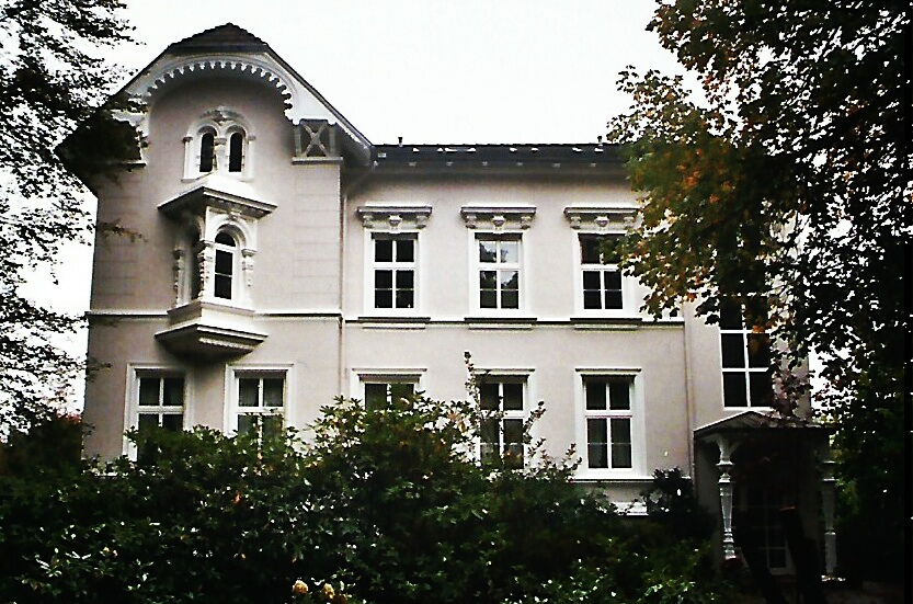 Lübecker Wohnsitz Willy Rohr. Ehemaliger Kommandeur des Sturm-Bataillons Nr. 5 (Rohr), Direktor der Lübecker Getreidebank.